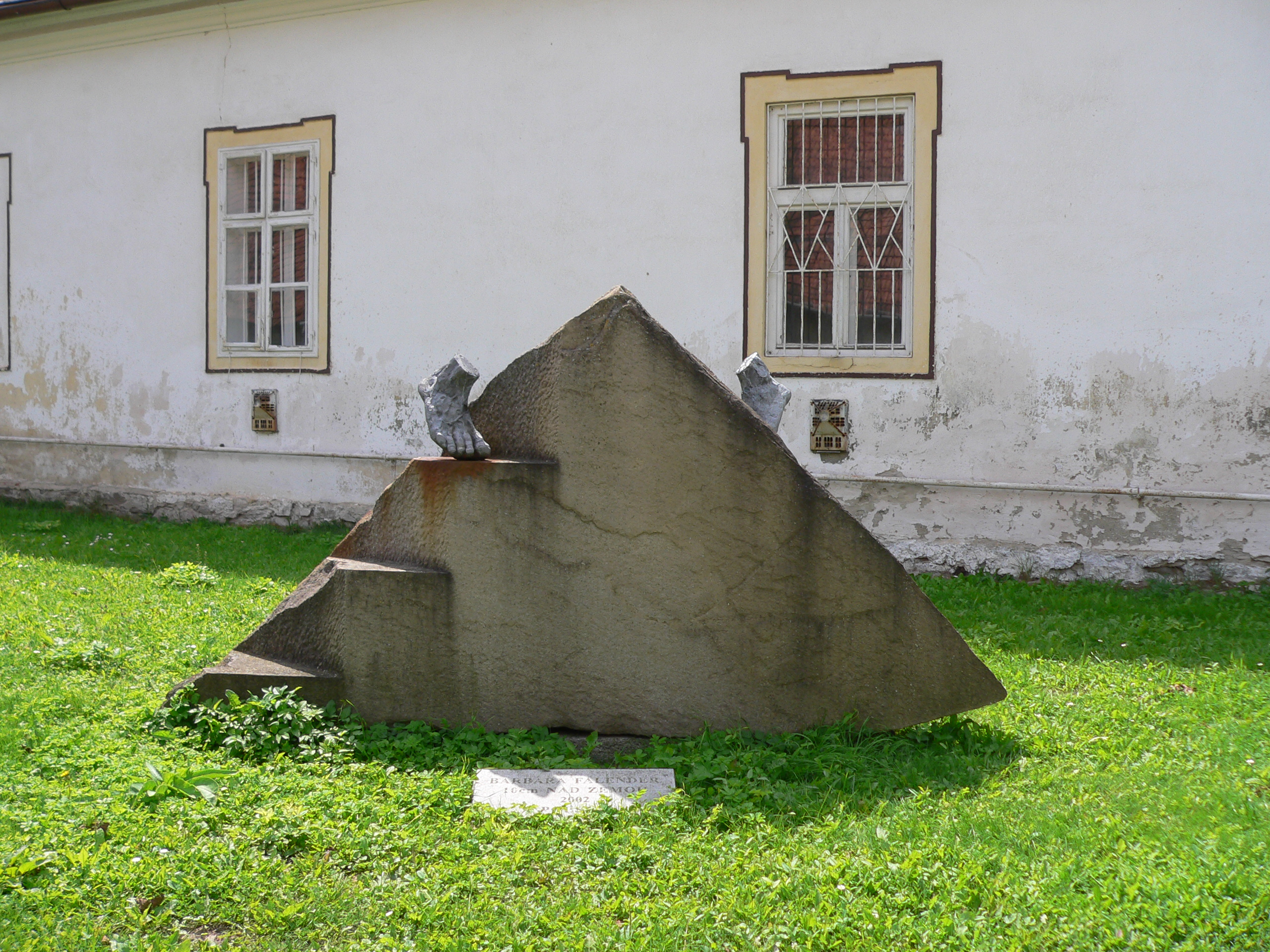 Barbara Falender - 10 cm nad zemou (2002, Polsko), socha nacházející se ve Veľkém Šariši (Slovensko).